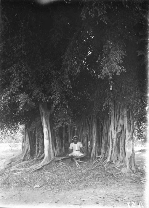 Foto. Java, man gezeten onder een waringinboom